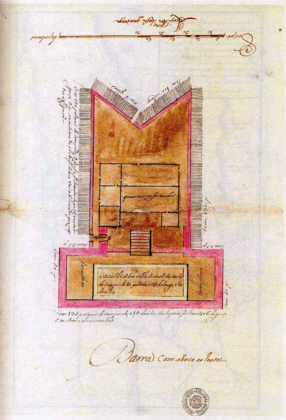 Planta do Forte de São João da Bertioga, c. 1751, por Luís Antônio de Sá Queiroga.